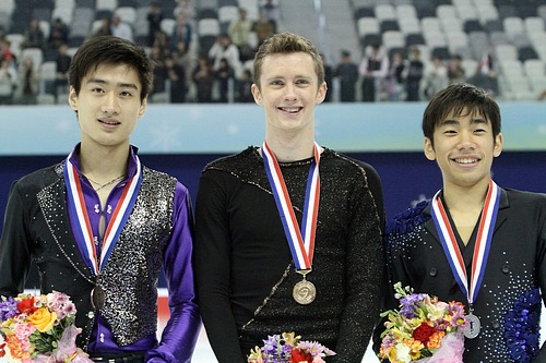 Подиум в мужском одиночном катании на Кубке Китая 2011. Слева на право: Сун Нань (3-е место), Джереми Эбботт (1-е место), Нобунари Ода (2-е место)